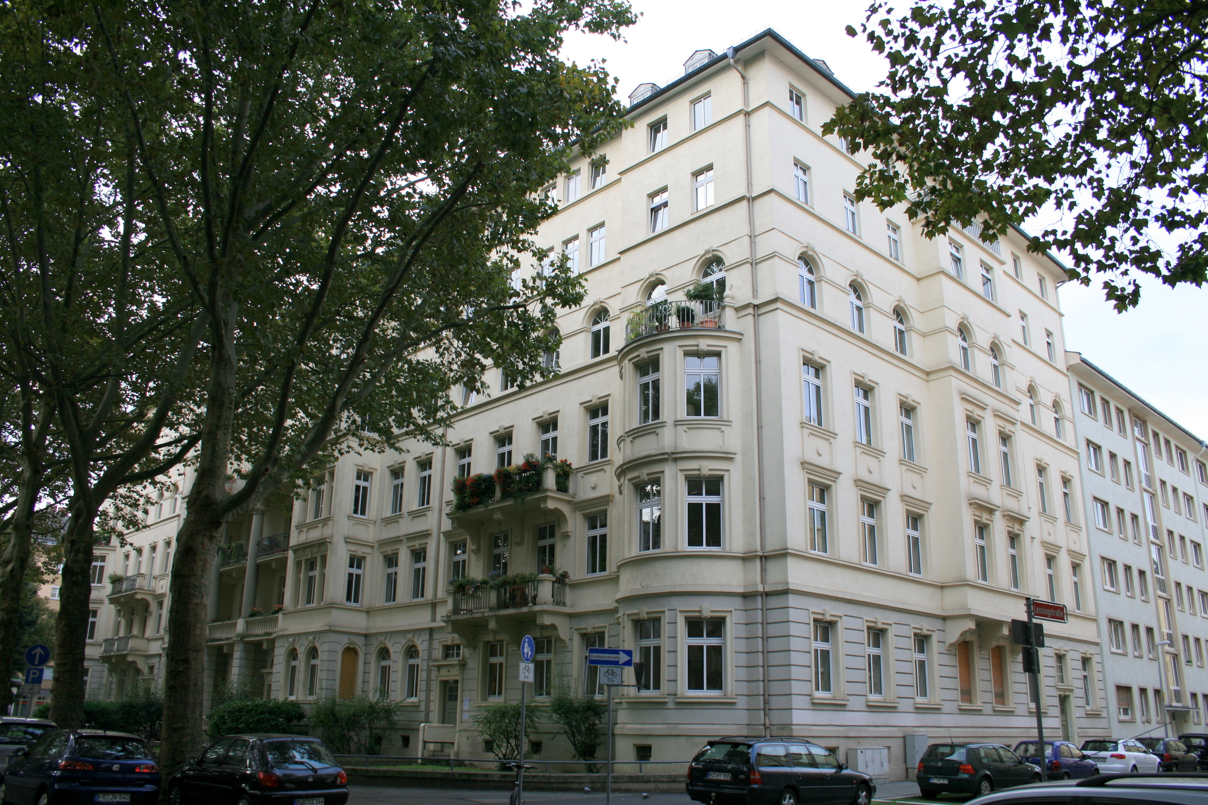 Mainz/Neustadt. Hindenburgstraße 43–49, Josefstraße 39a, Lessingstraße 22 ehem. „Wohnhäuser zur Unterbringung von Offiziers- und Beamtenfamilien der Besatzung“; monumentale, urspr. viergeschossige Wohnanlage, 1921, Architekt Peter Gustav Rühl.